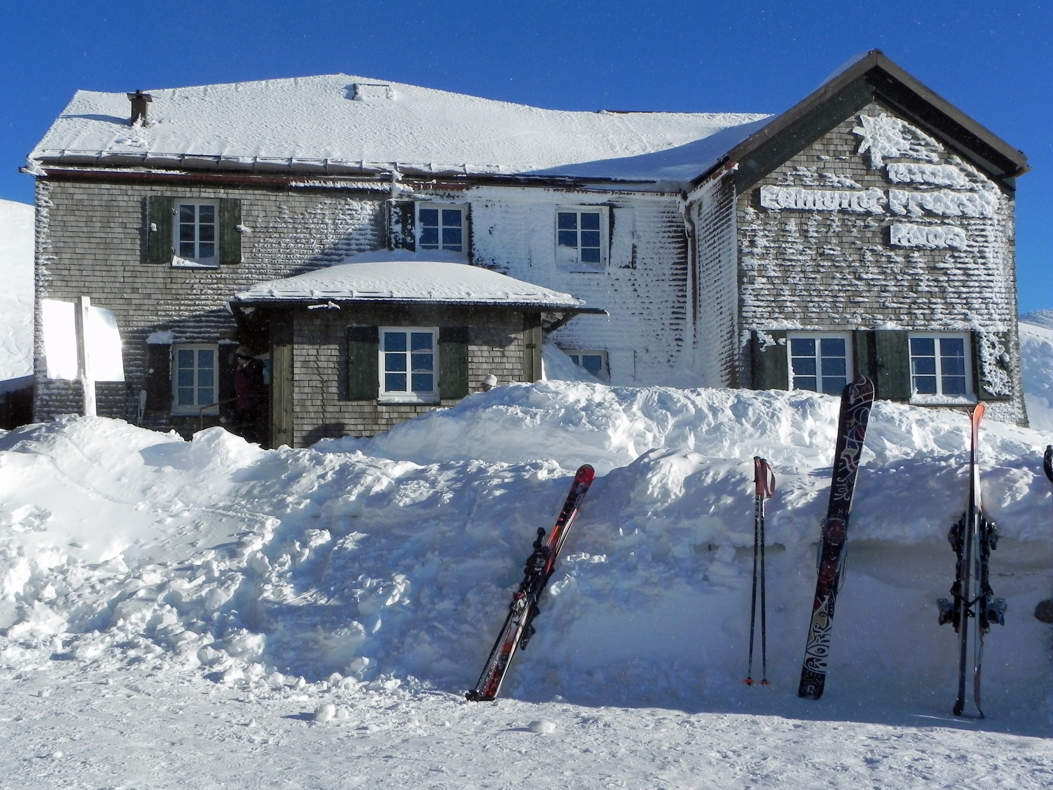 Edmund-Probst-Haus nahe der Seilbahnstation Höfatsblick am Nebelhorn